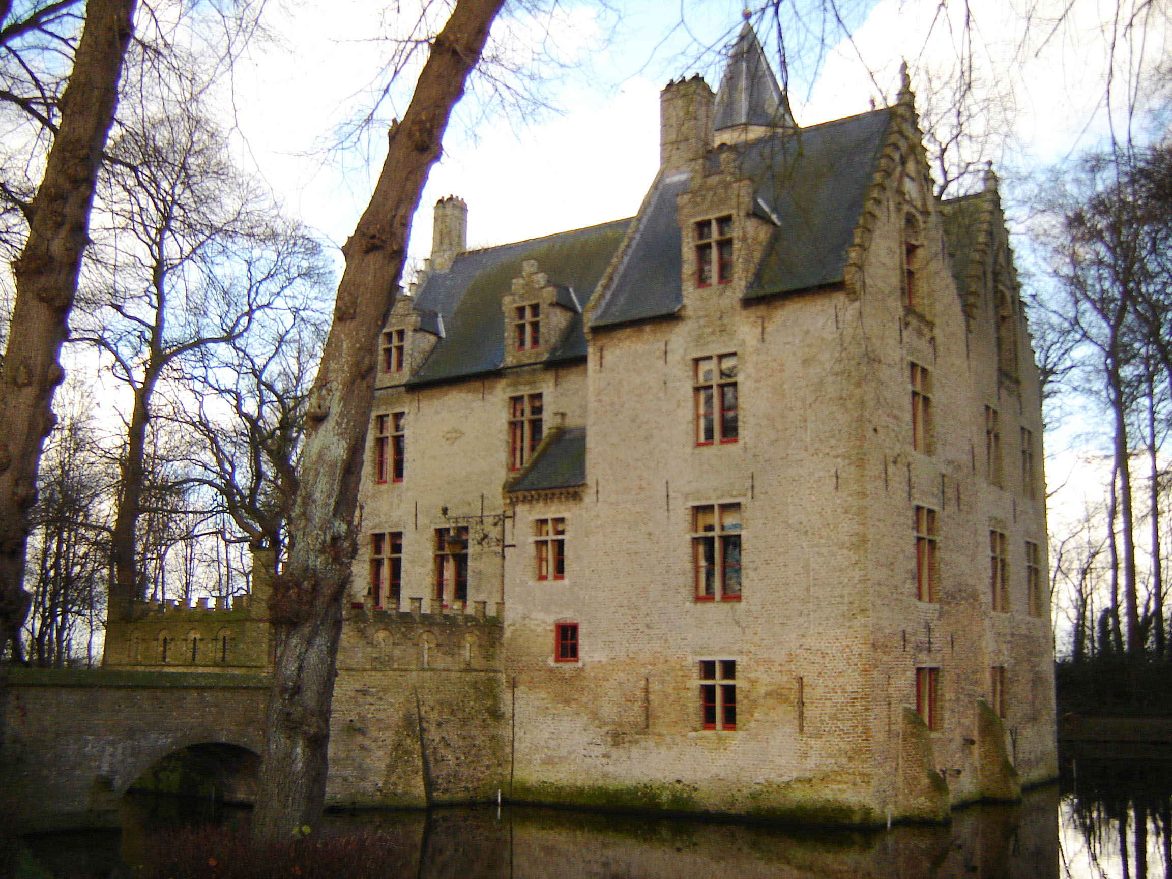 Kasteel van Beauvoorde in Wulveringem/Beauvoorde, Veurne. Castle of Beauvoorde in Wulveringem/Beauvoorde, Veurne, West-Flanders, Belgium